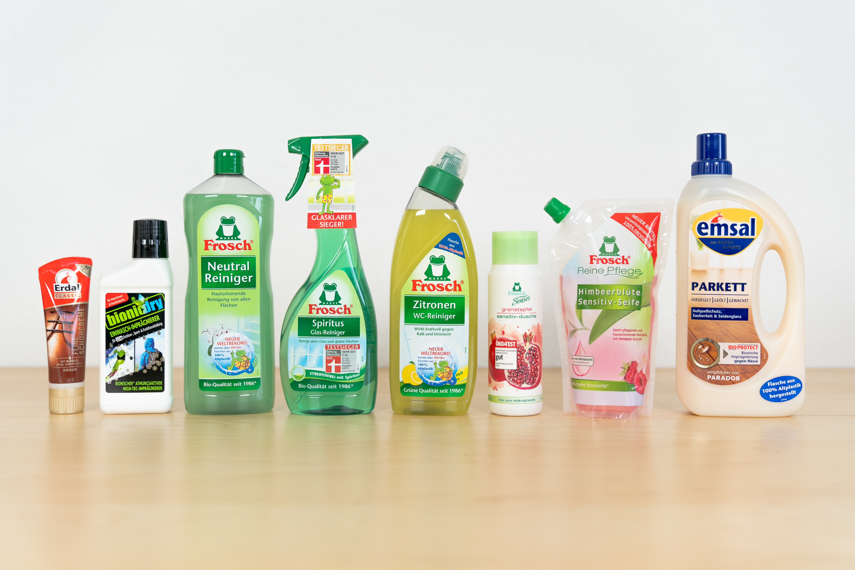 Eine beispielhafte Auswahl veschiedener Produkte von Werner & Mertz